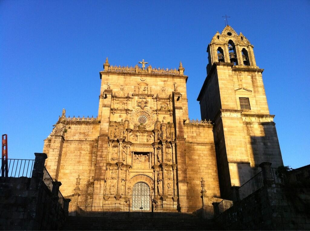 Iglesia de santa María es el mejor ejemplo de una edificación de estilo religioso de Pontevedra. Se empieza a construir en el siglo XVI y ha sido declarada Monumento histórico Artístico en 1931, Santa María conjuga a la perfección el Gótico tardío con el Renacimiento. La iglesia de Santa María combina perfectamente el estilo gótico tardío con el Renacimiento (su fachada principal (s. XVI), ) es una de las principales obras de estilo plateresco en Galicia, curiosamente en ella aparece Santo Xerome con gafas. En el interio de la Iglesia, bajo unas impresionantes bóvedas de crucería podemos ver el Cristo del Desenclavo (s. XVI), el Cristo de los Marineros (s. XVIII)